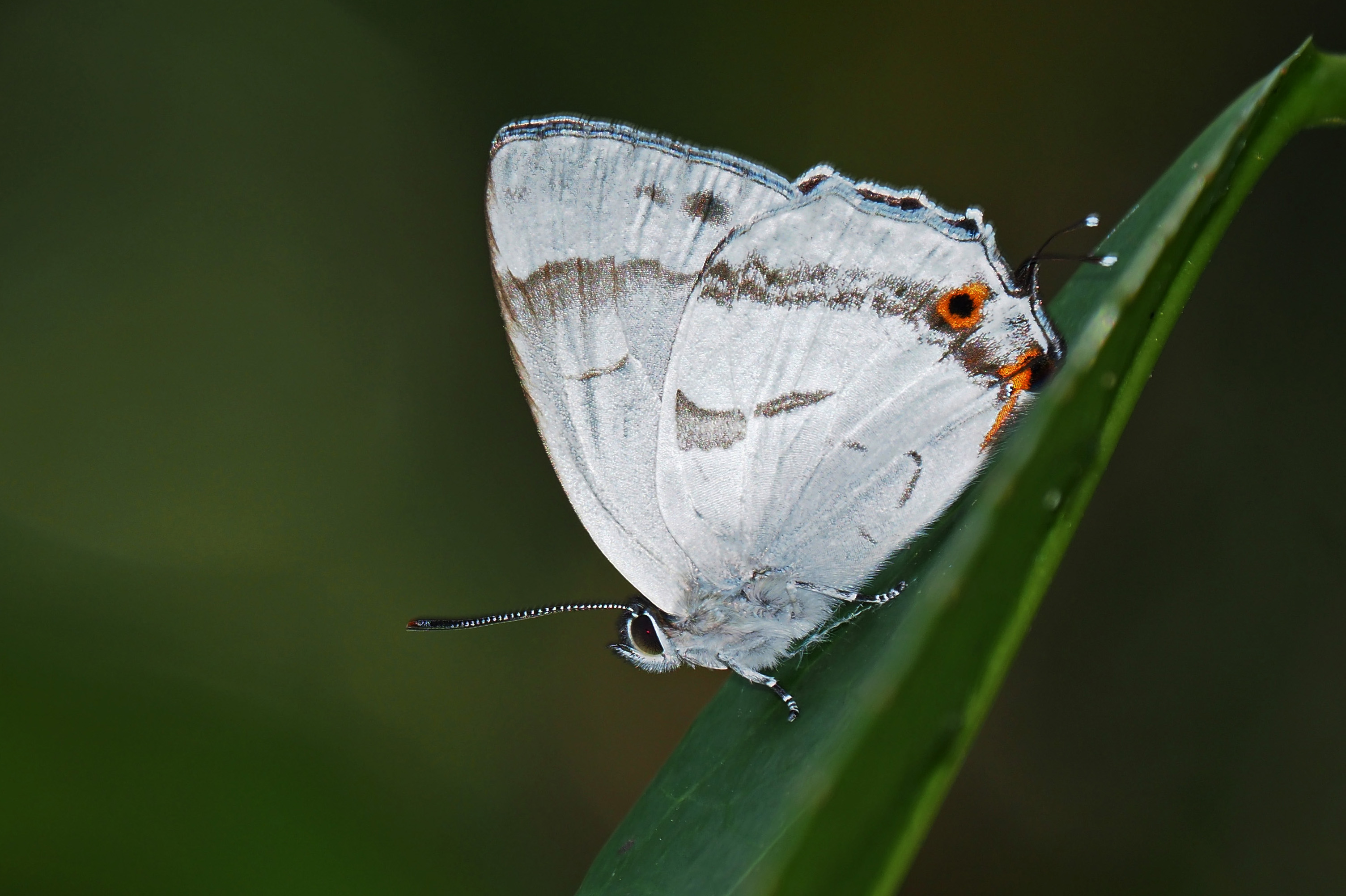 白芒翠灰蝶 Chrysozephyrus ataxus lingi